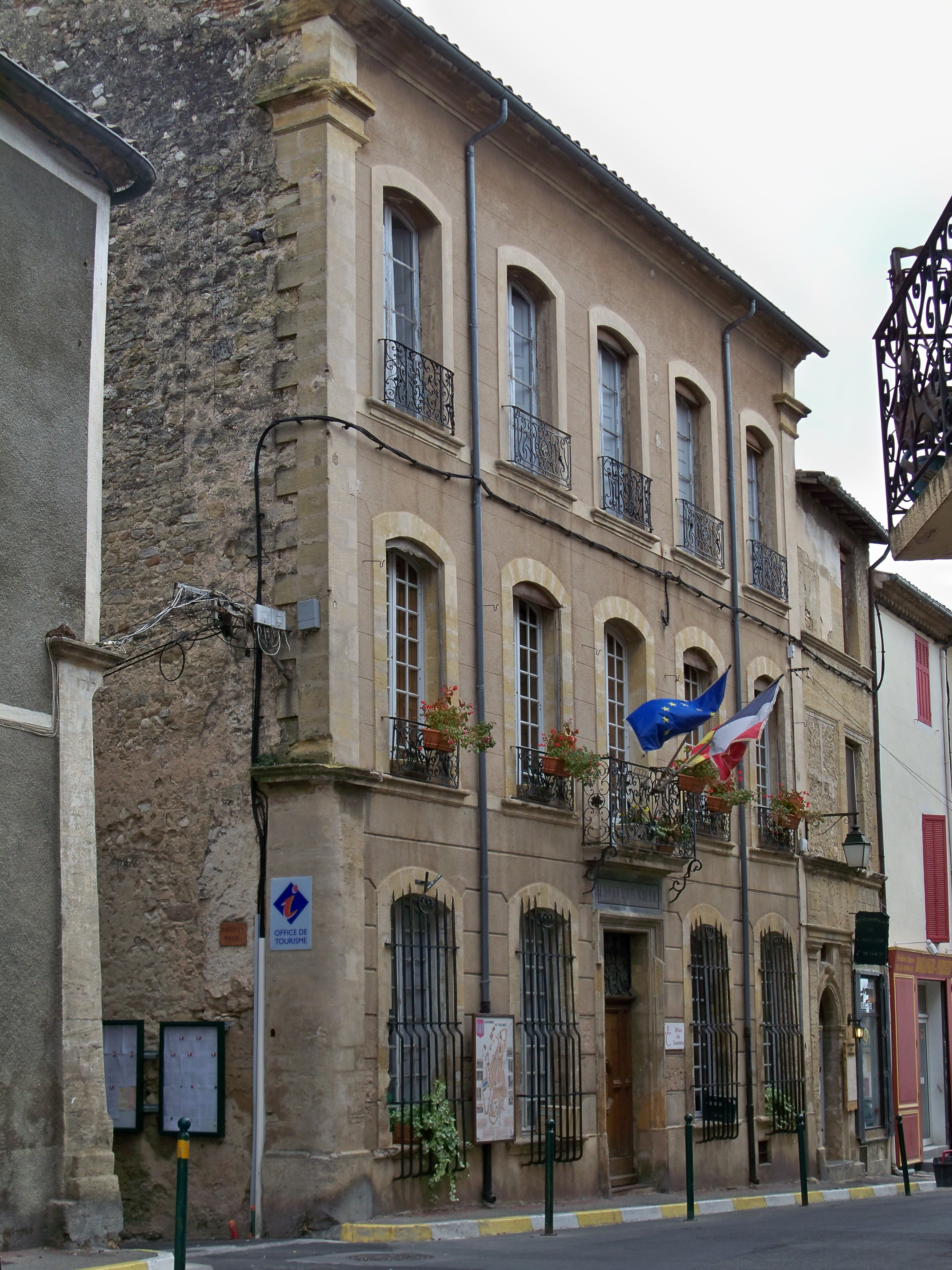 Mairie de Cucuron (84)